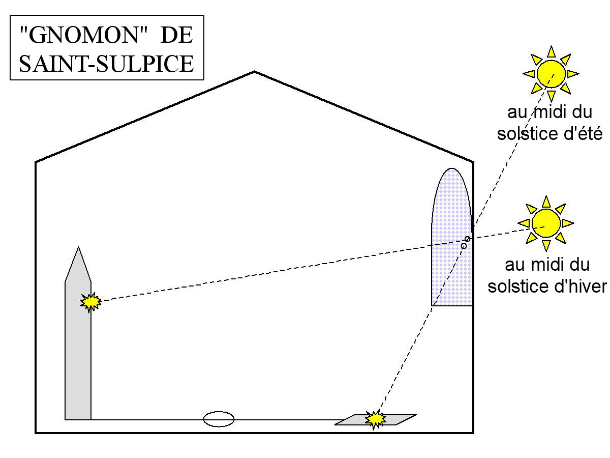 Schéma de la méridienne de Saint-Sulpice